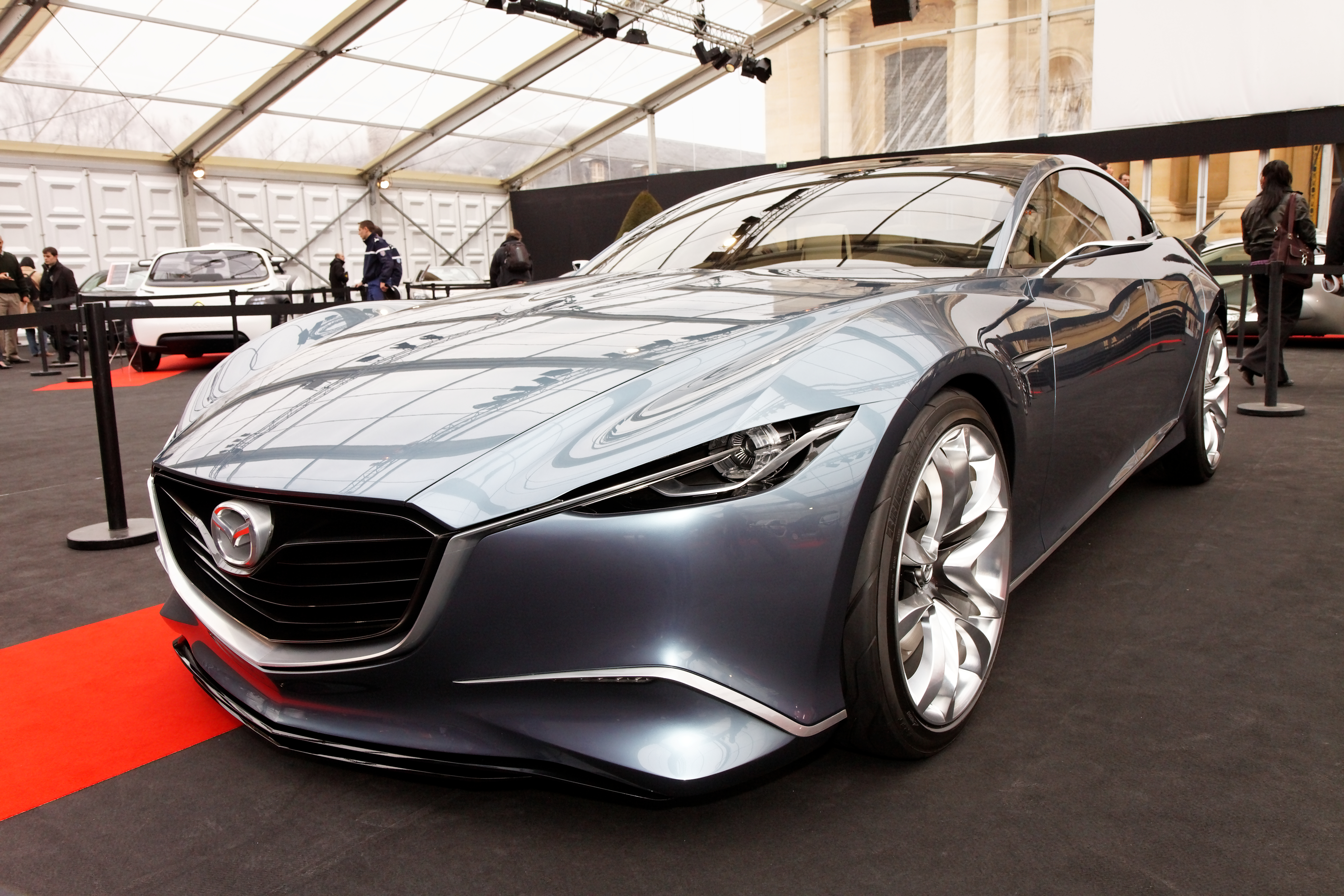 La Mazda Shinari exposée devant le dôme des Invalides lors du festival automobile international 2011.